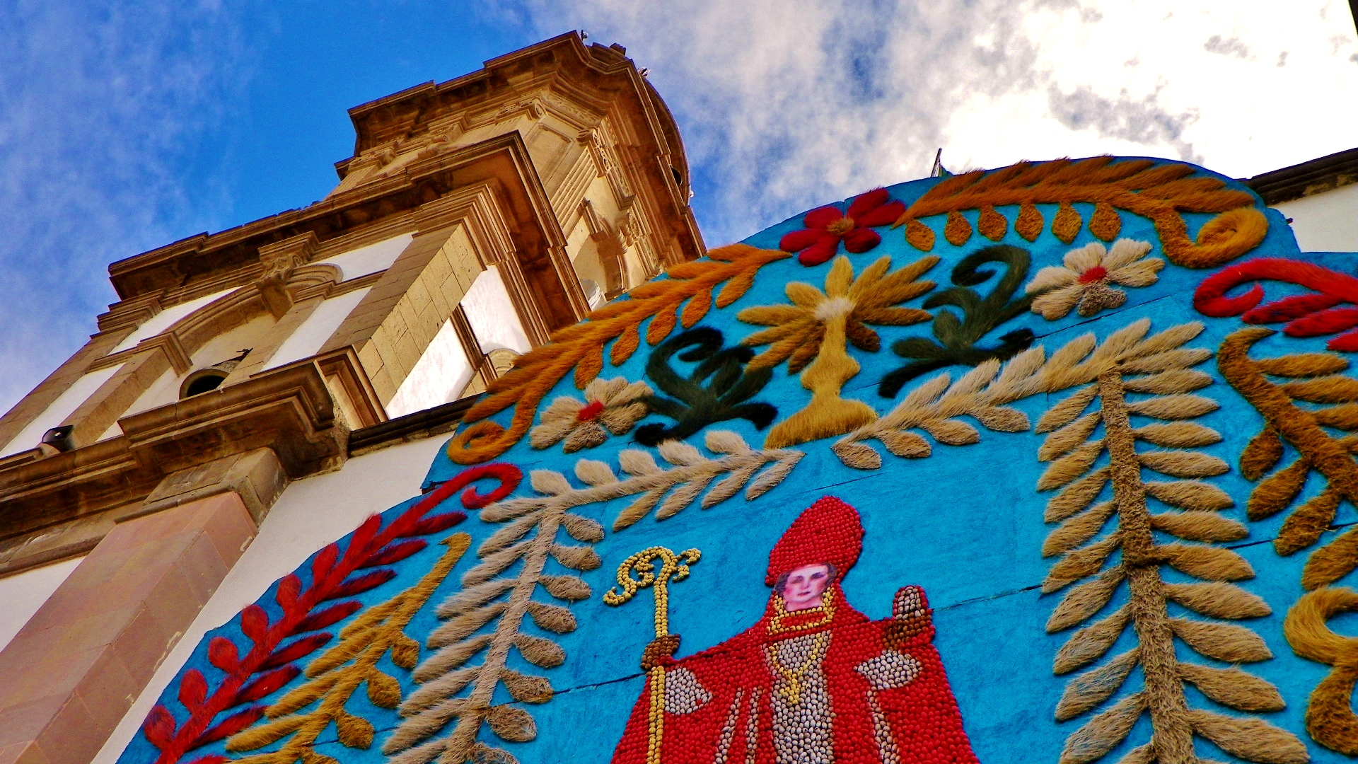 Parroquia de San Martín Obispo, San Martín de las Pirámides, Estado de México.